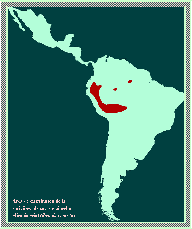 Mapa del área de distribución de Glironia venusta